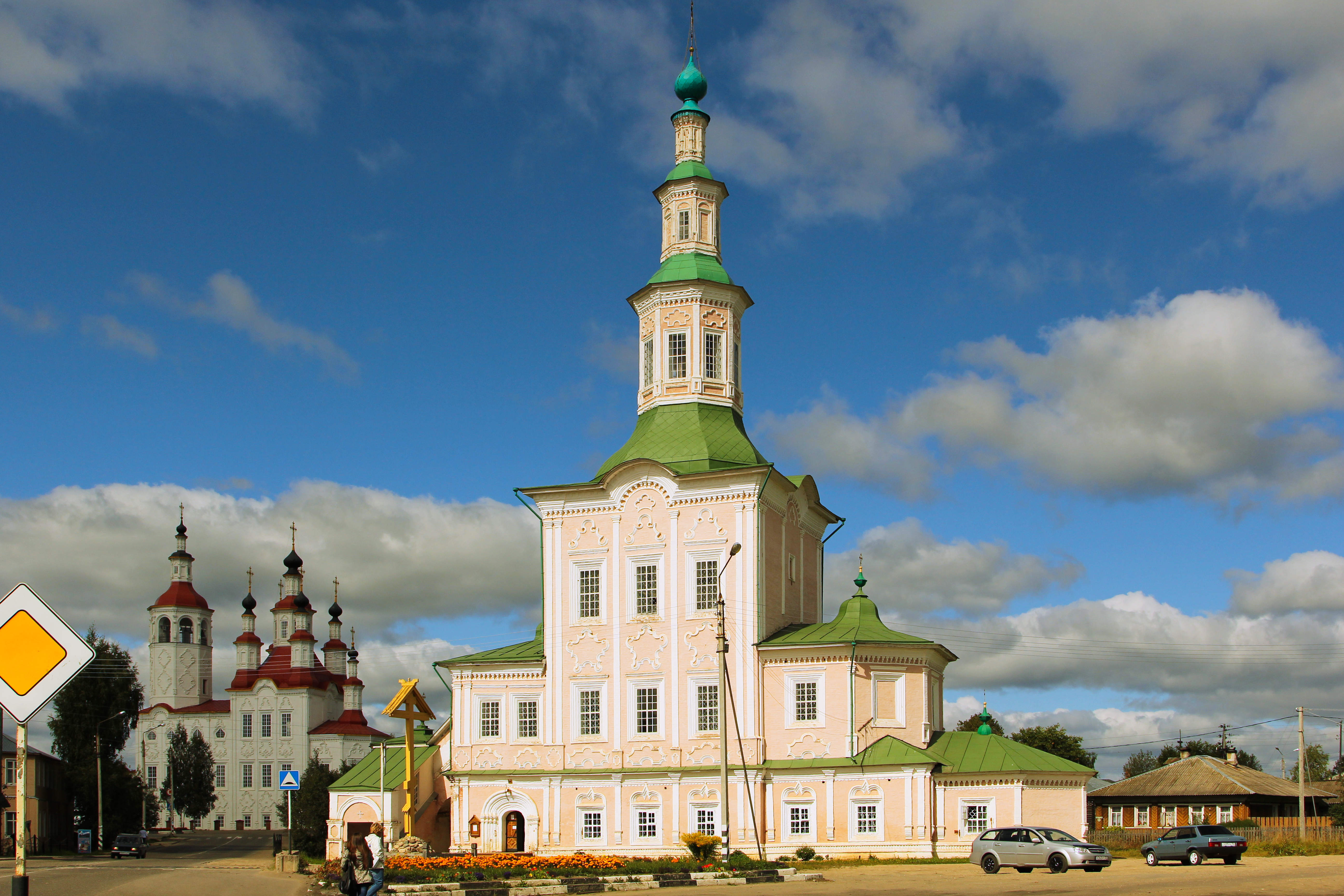 Церковь Рождества Христова (Вологодская область, Тотьма, улица Ленина, 31 (Кирова улица))